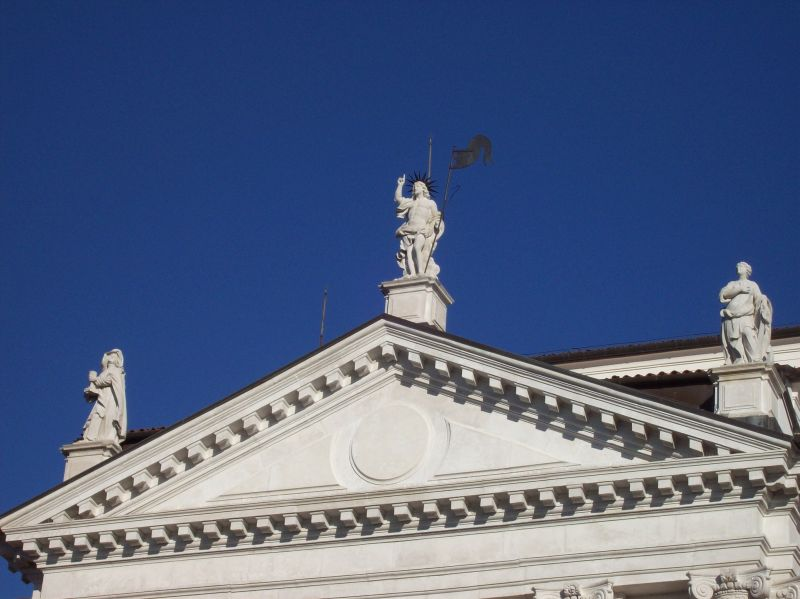 Duomo di San Daniele del Friuli, particolare